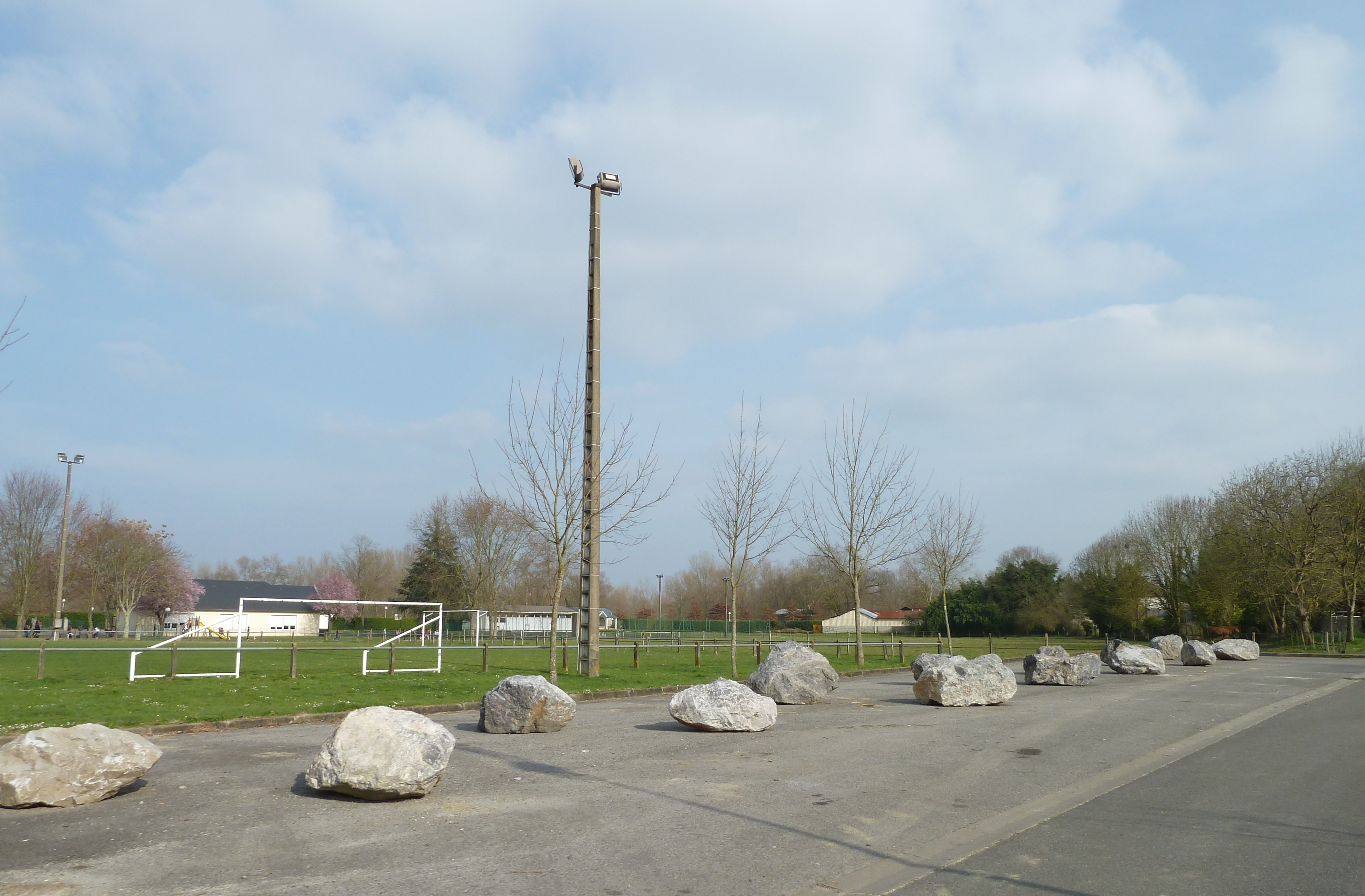 Laroin